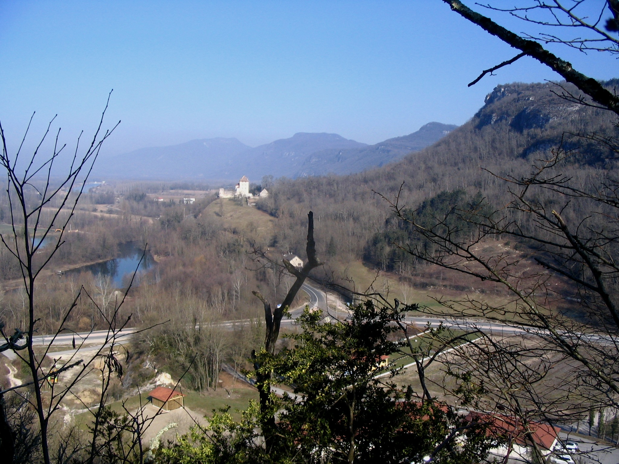 Brégnier-Cordon : vue du Château de la Barre, de Mont Cordon et de la Montagne de St Benoit (Chaine du Bugey) depuis le carrefour entre la D19 et la D992